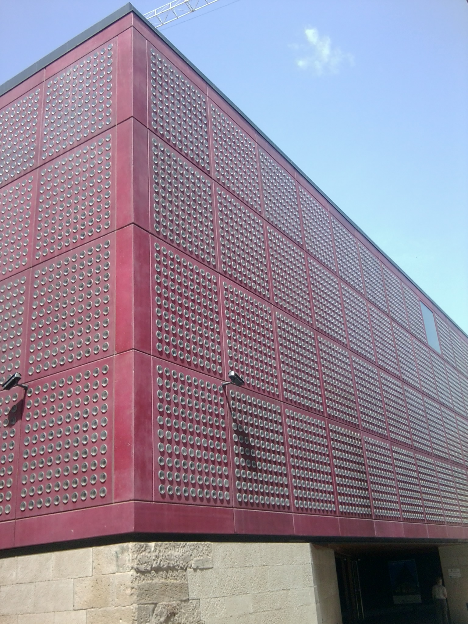 Imagen del botellero del museo del rioja. Logroño.